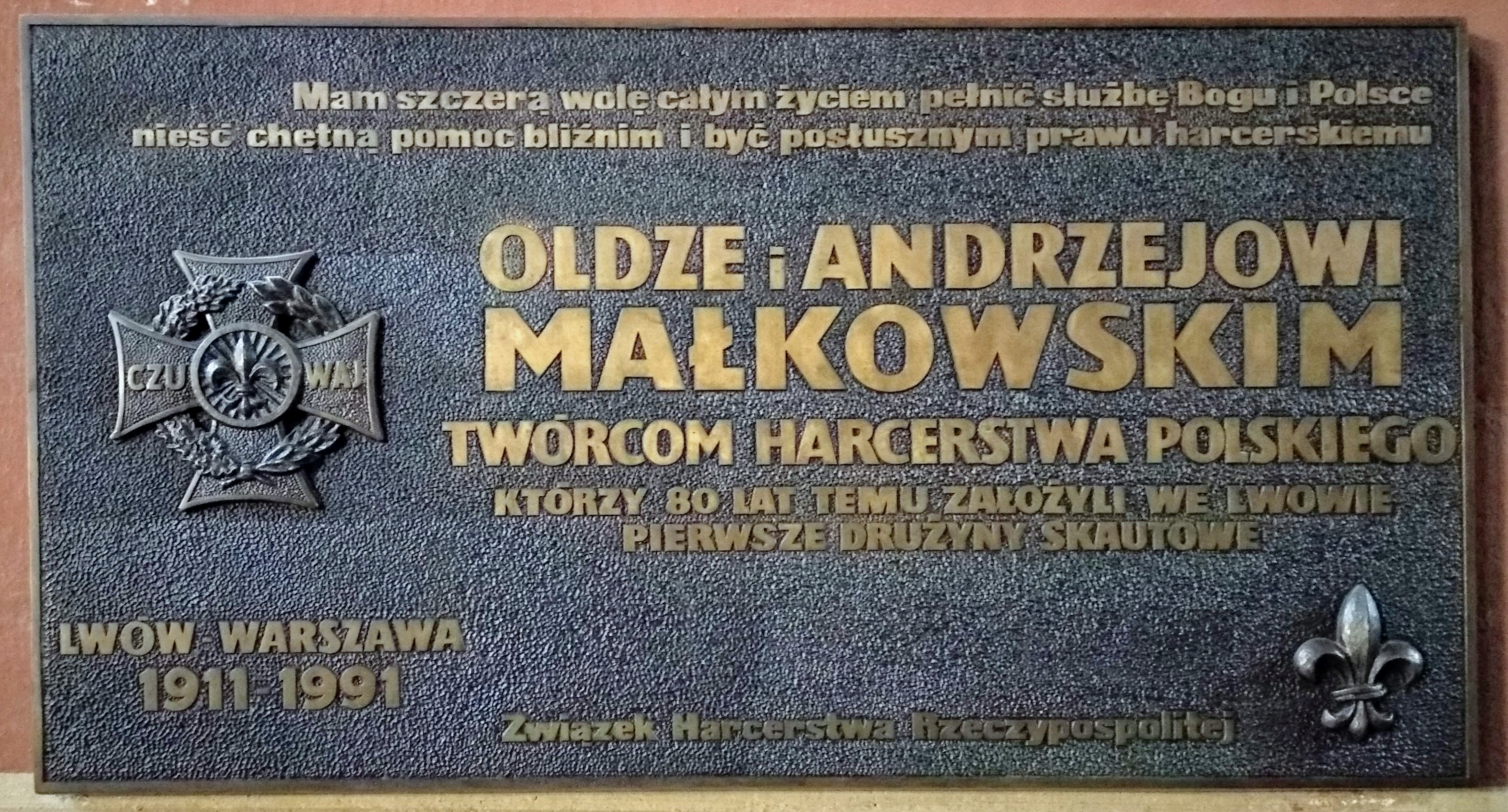 Tablica poświęcona twórcom harcerstwa Oldze i Andrzejowi Małkowskim odsłonięta i poświęcona w katedrze łacińskiej we Lwowie w 1991 r. z okazji 80-lecia powstania pierwszych drużyn skautowych